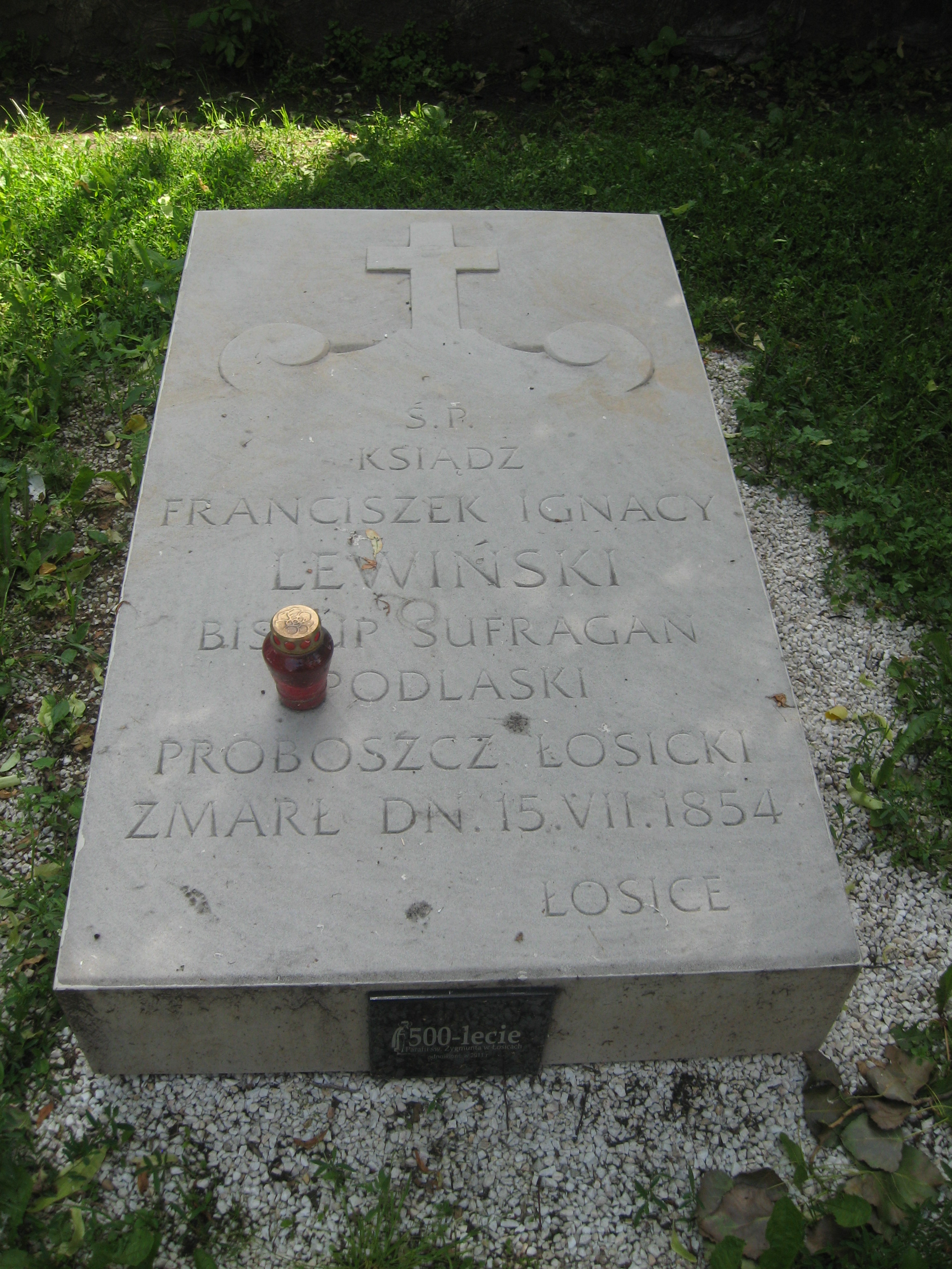 Łosice - zespół kościoła parafialnego p.w. św. Zygmunta Króla i Męczennika (1905-1910): nagrobek biskupa Franciszka Lewińskiego przy kościele św. Zygmunta